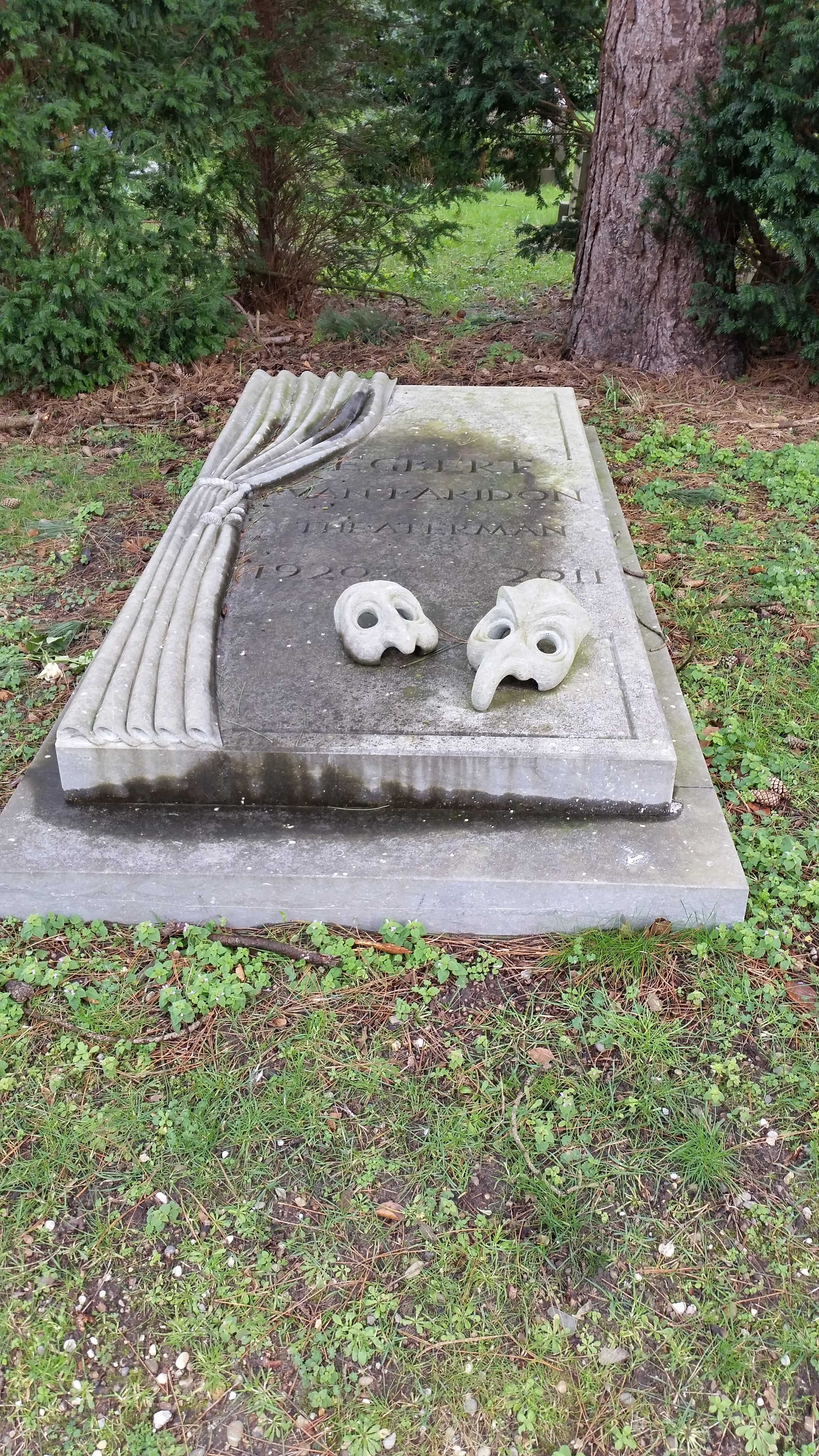 Grafsteen Egbert van Paridon op De Nieuwe Ooster, Amsterdam-Oost